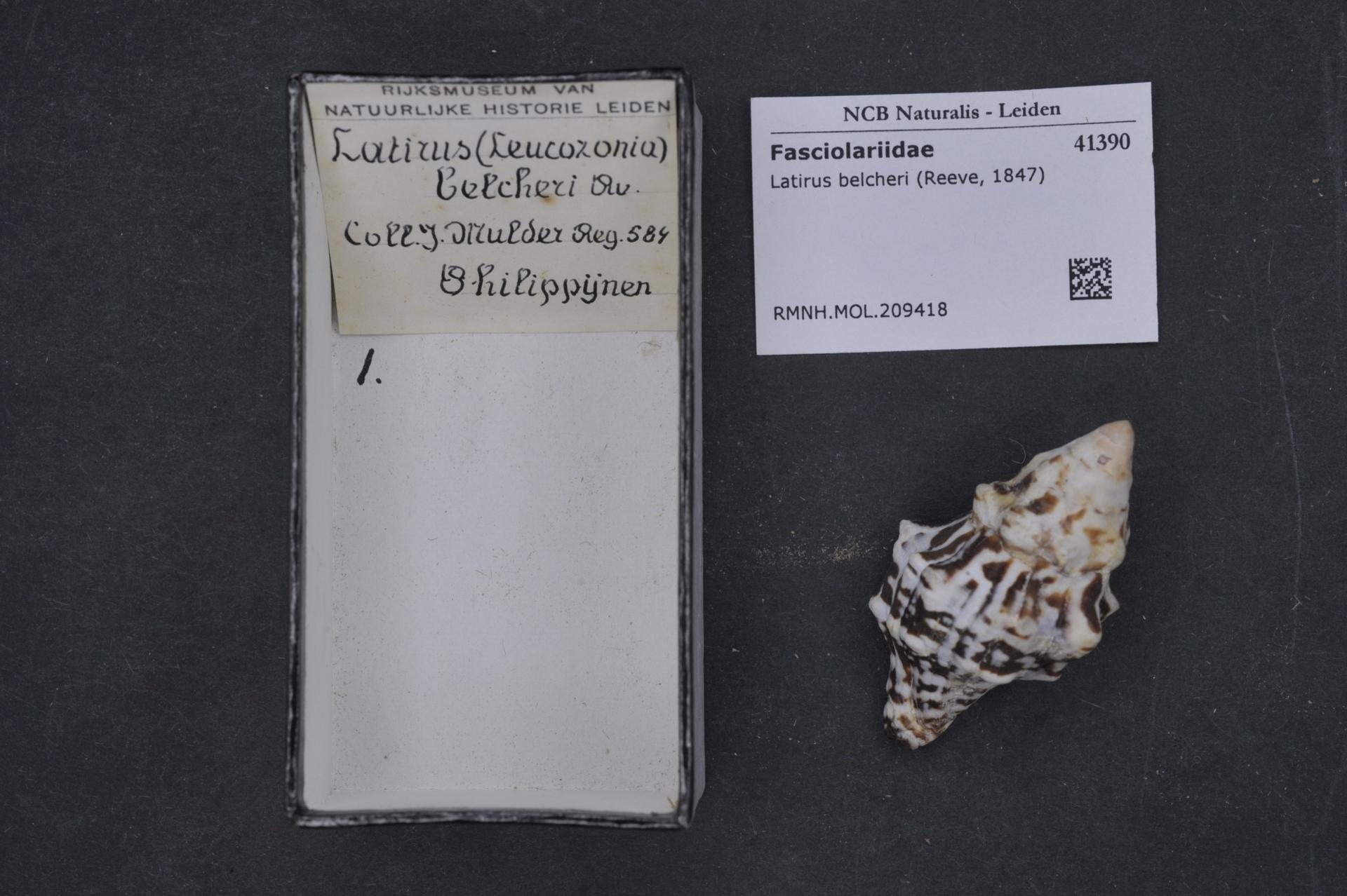 Latirus belcheri (Reeve, 1847)